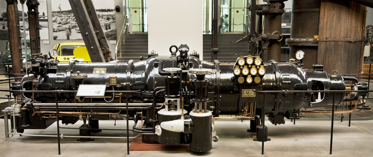 STAL mottrycks ångturbin av stål. I mitten ett s.k dubbelroterande skovelsystem vilket driver två elgeneratorer. Turbinen är utrustad med ett flerskivigt skovelsystem som ger vissa termodynamiska fördelar. Effekt 1500 kw. Trefas generator typ G 38/75, No 1704108-109, KVA 1875, 4200 volt, 3000 varv, kontinuerlig drift, amp 258, cos(Ø) 0,8, Y-koppl. 50 per, magn.volt 110, magn.amp. 170. Levererad till Höganäsbolaget 1942 och togs ur drift i slutet av 1980-talet. Representerar en svensk "paradprodukt" baserad på bröderna Ljungströms uppfinning av dubbelrotationsturbinen. Renoverad av ABB STAL i Finspång.